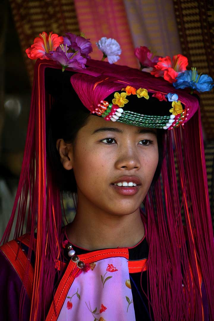 Lisu woman